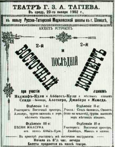 Bakıda 2-ci "Şərq konserti"nin afişası